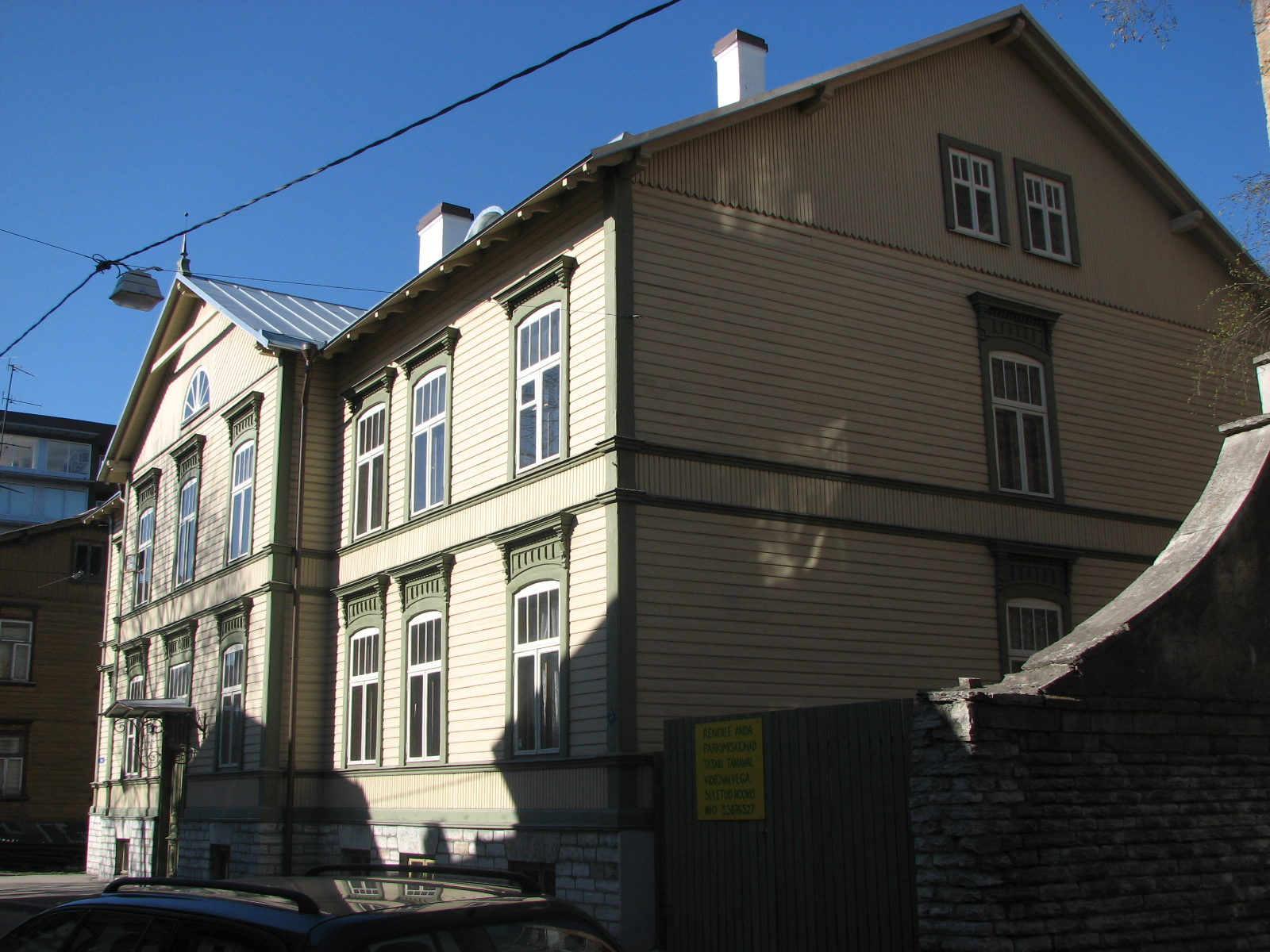 Elamu Tatari tn 20 Tallinnas 1899. aastast